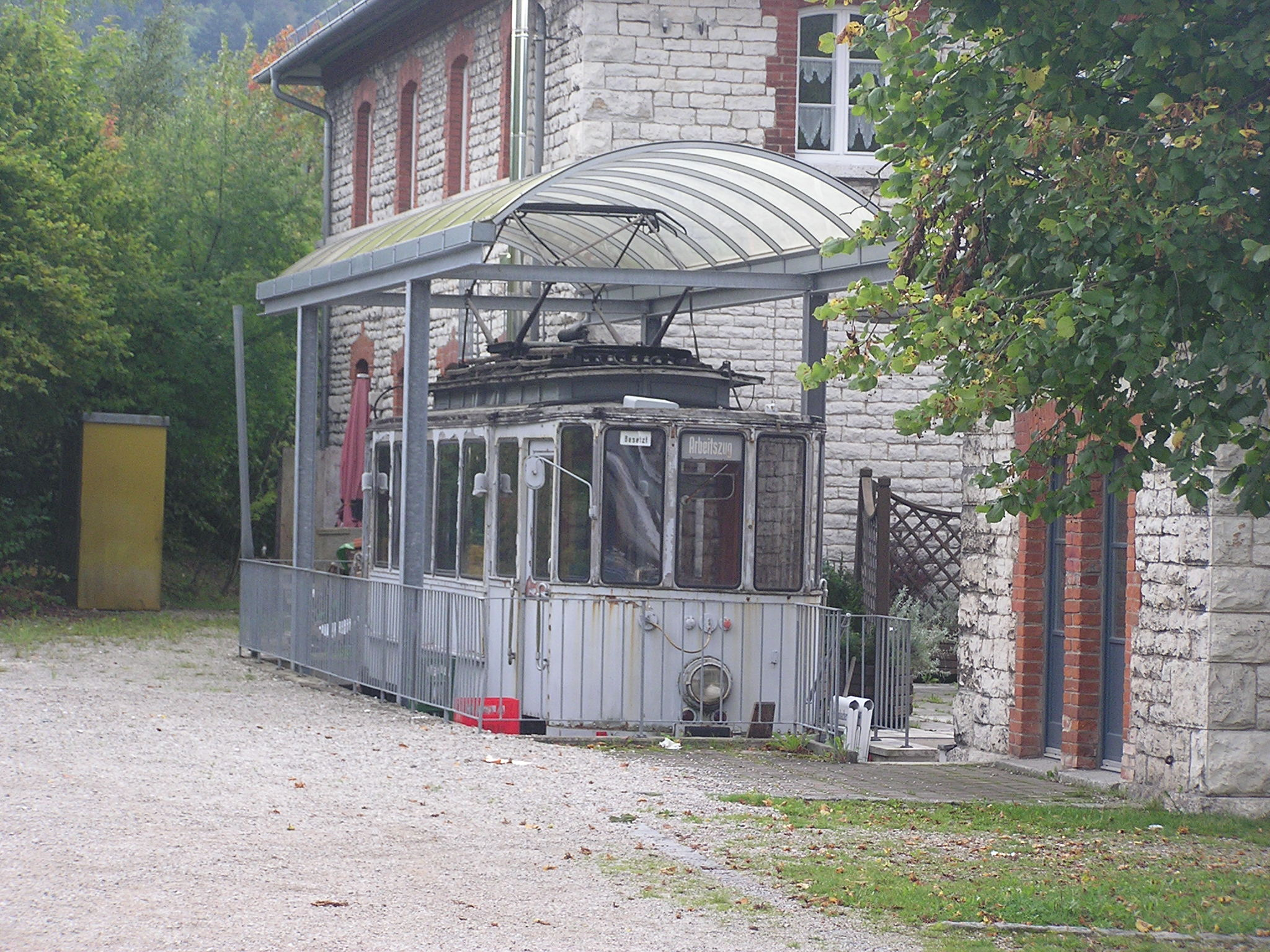 Beilngries, ehemaliger Bahnhof mit unbekanntem Fahrzeug, möglicherweise alte Nürnberger Straßenbahn